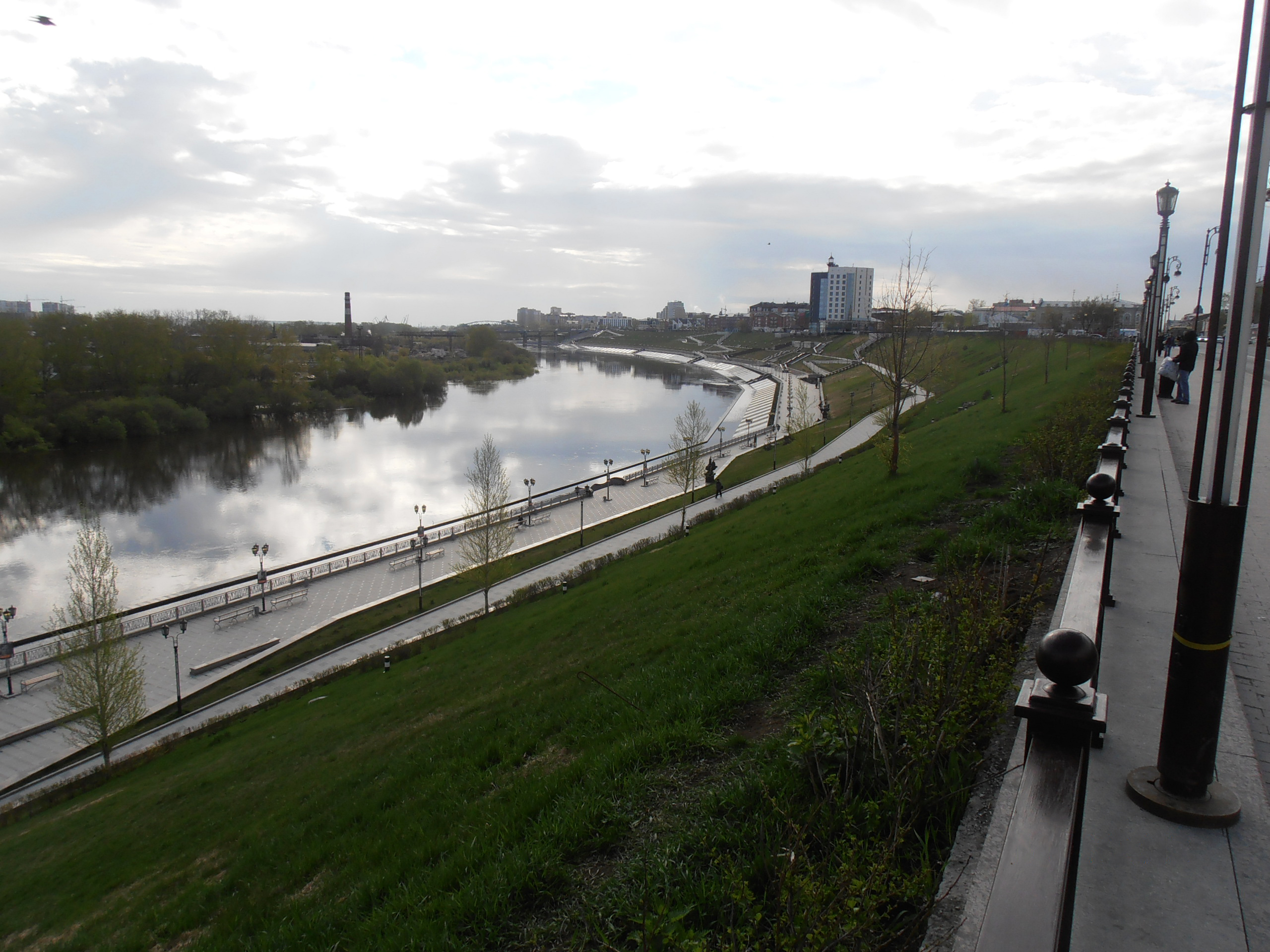 Набережная Туры в Тюмени